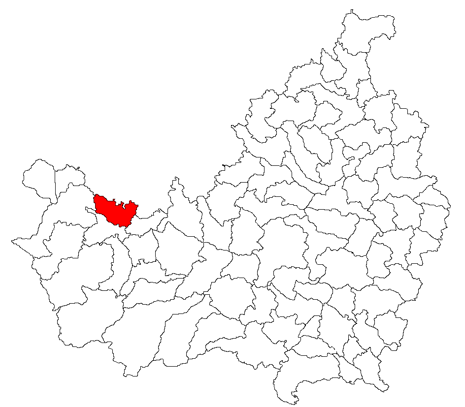 Categorie:Hărţi ale judeţului Cluj